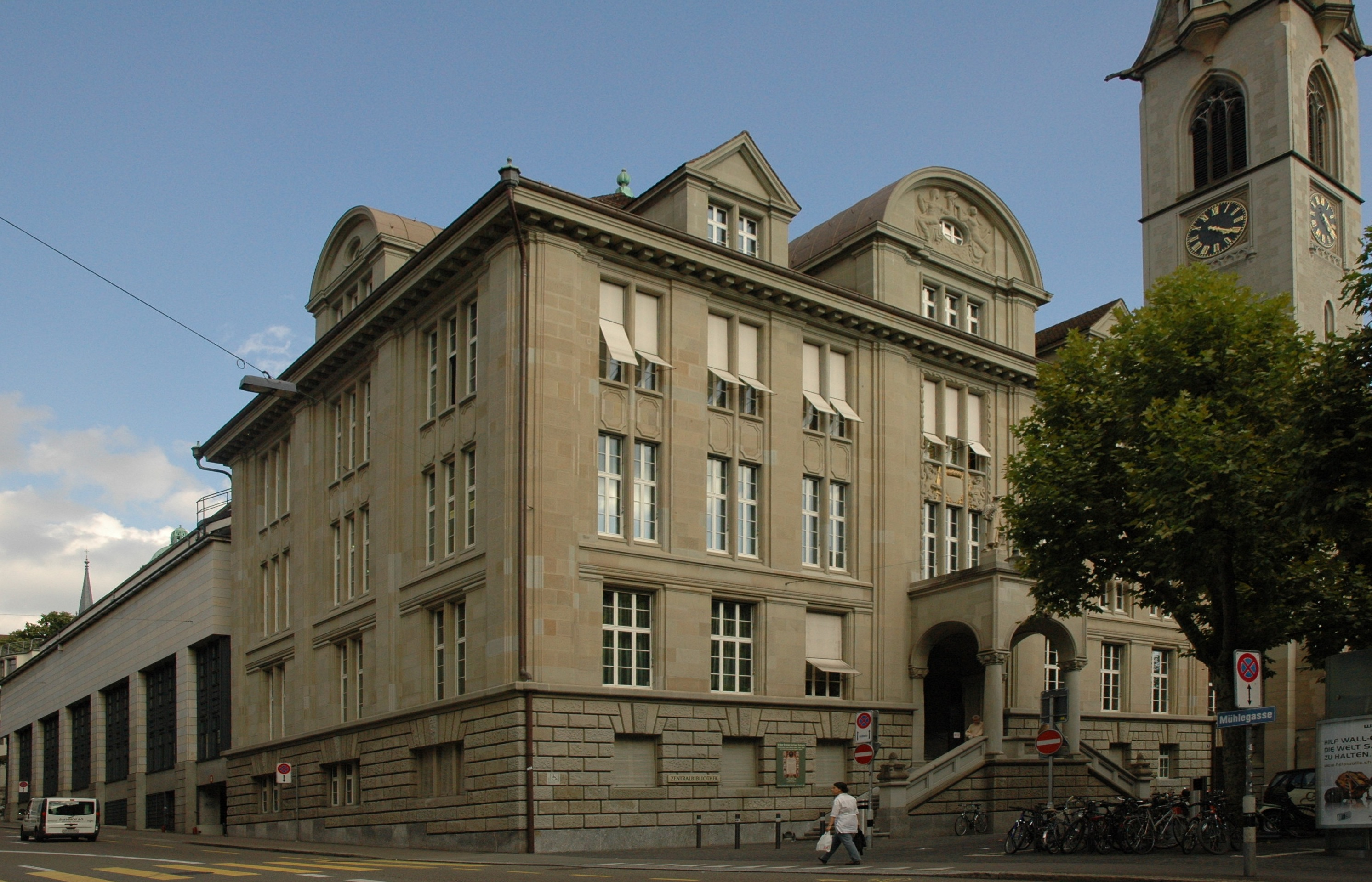 Zentralbibliothek Zürich